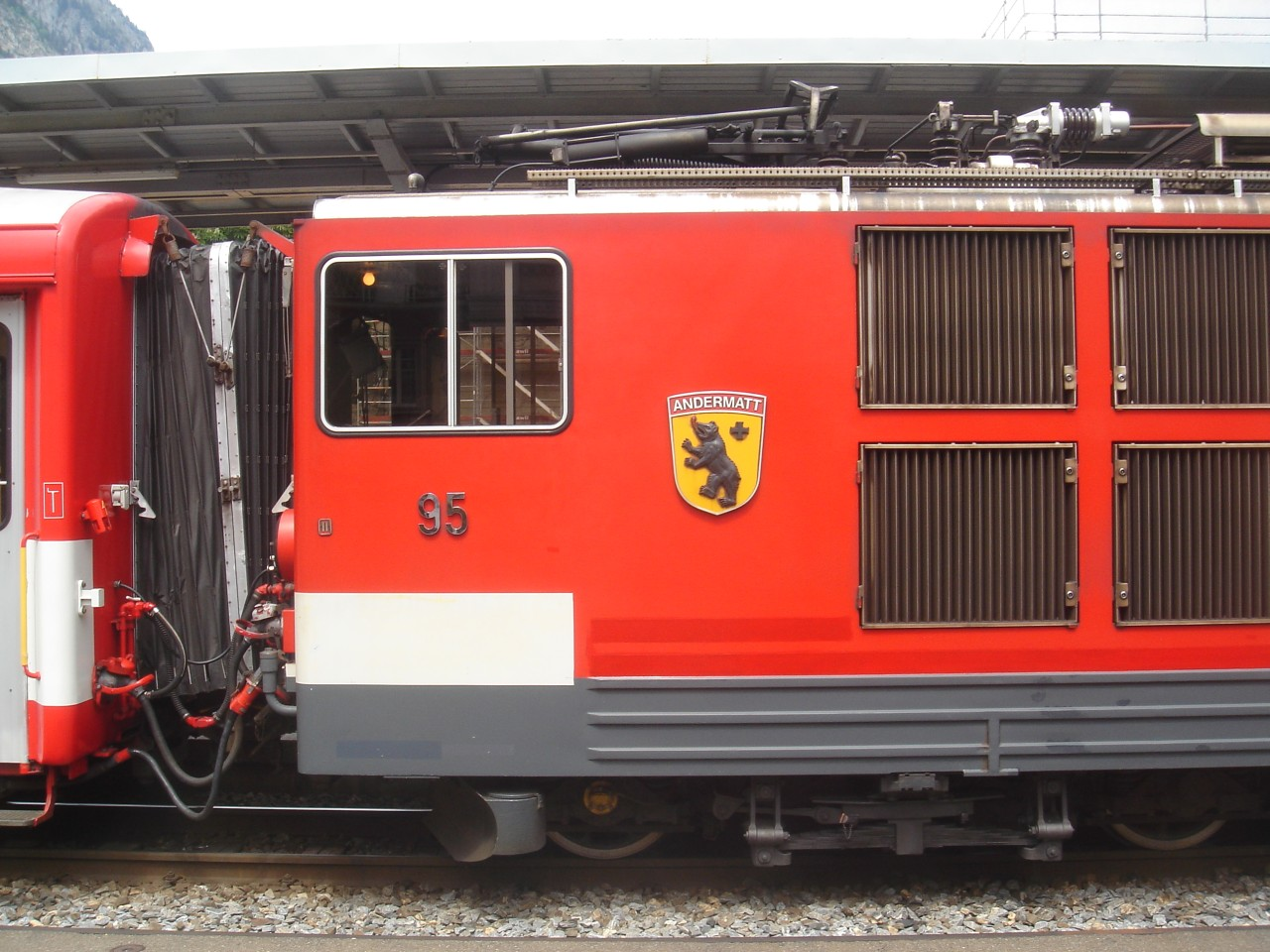 Wappen von Andermatt auf dem FO/MGB Deh 4/4II 95